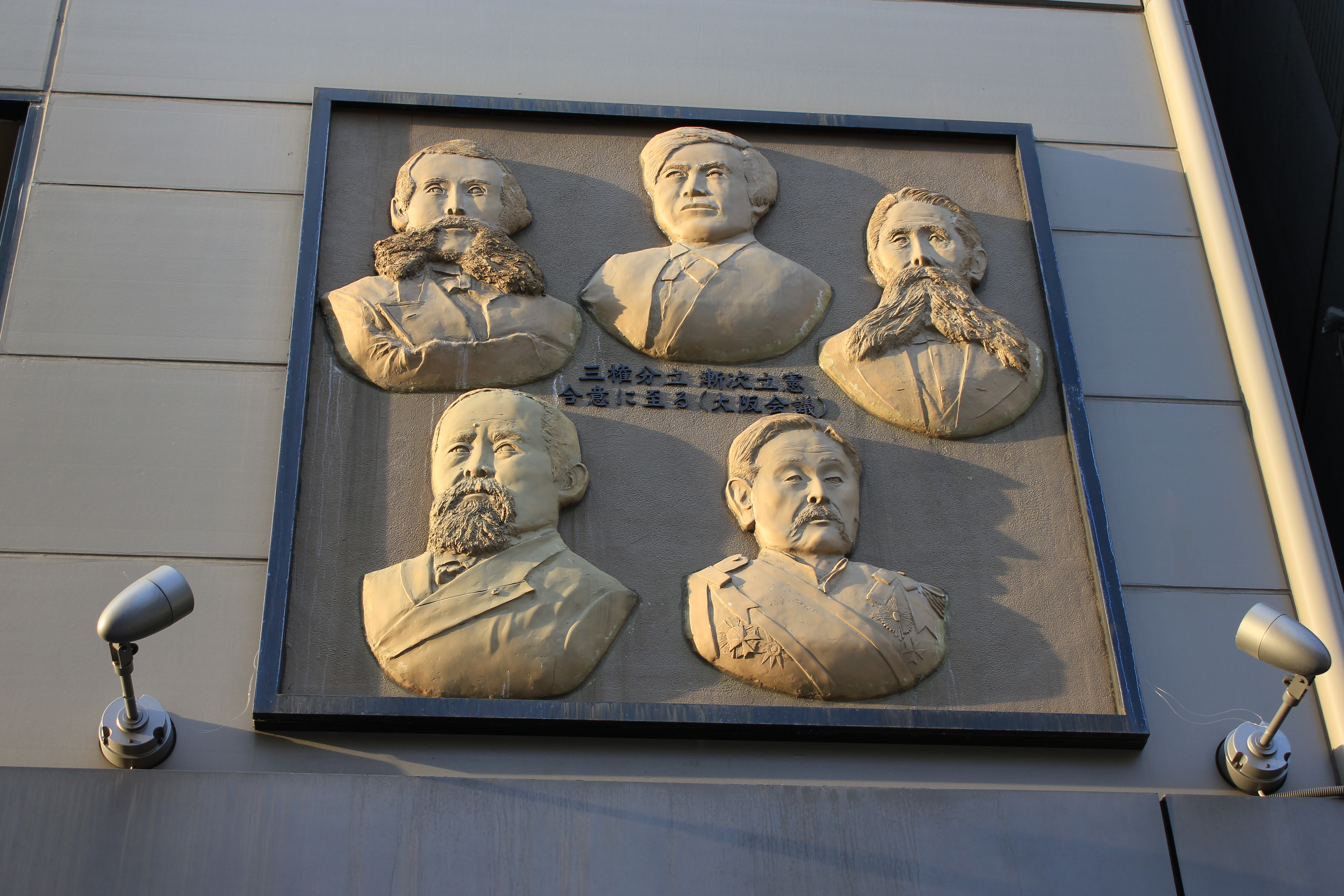 大阪会議開催の地レリーフ